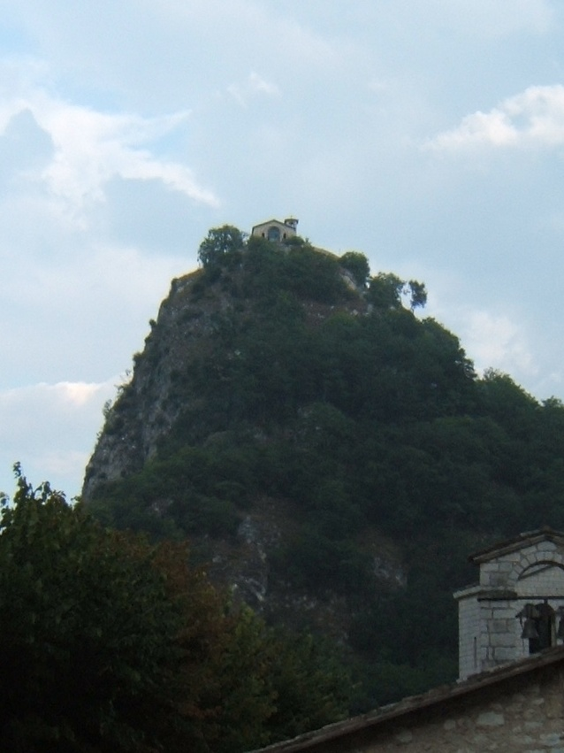 roccaporena vista da lontano, scoglio di santa Rita